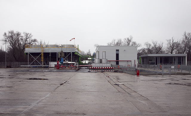 Geothermiekraftwerk Landau/Pfalz